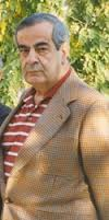 منوچهر آگاه